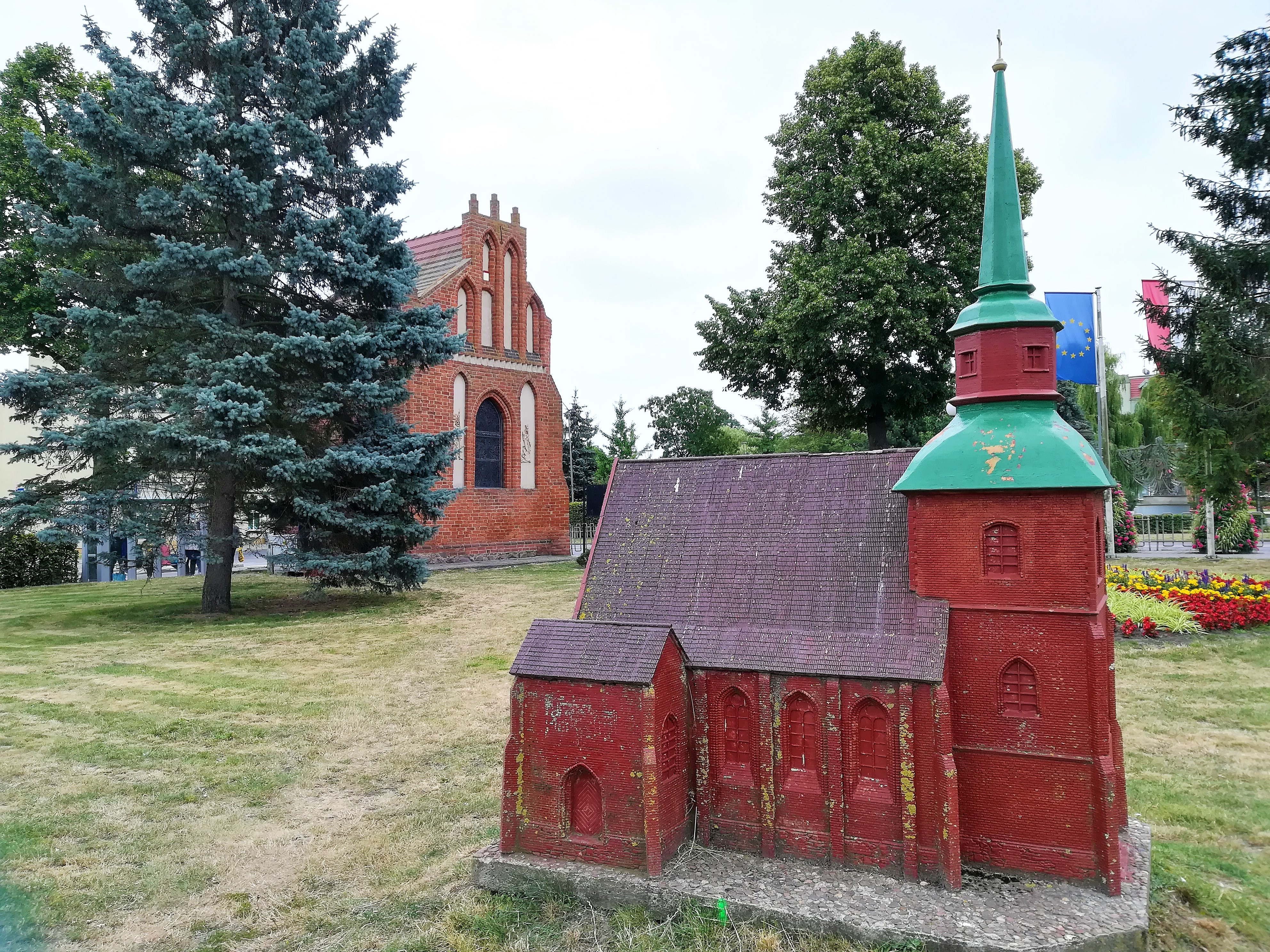 Dawny kościół Mariacki w Policach (Rynek).